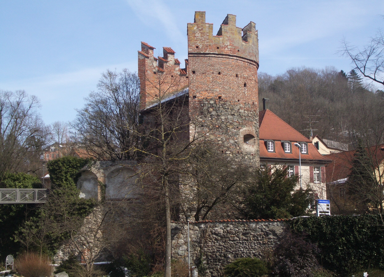 Ravensburg, Germany: Wehrturm am Gänsbühl